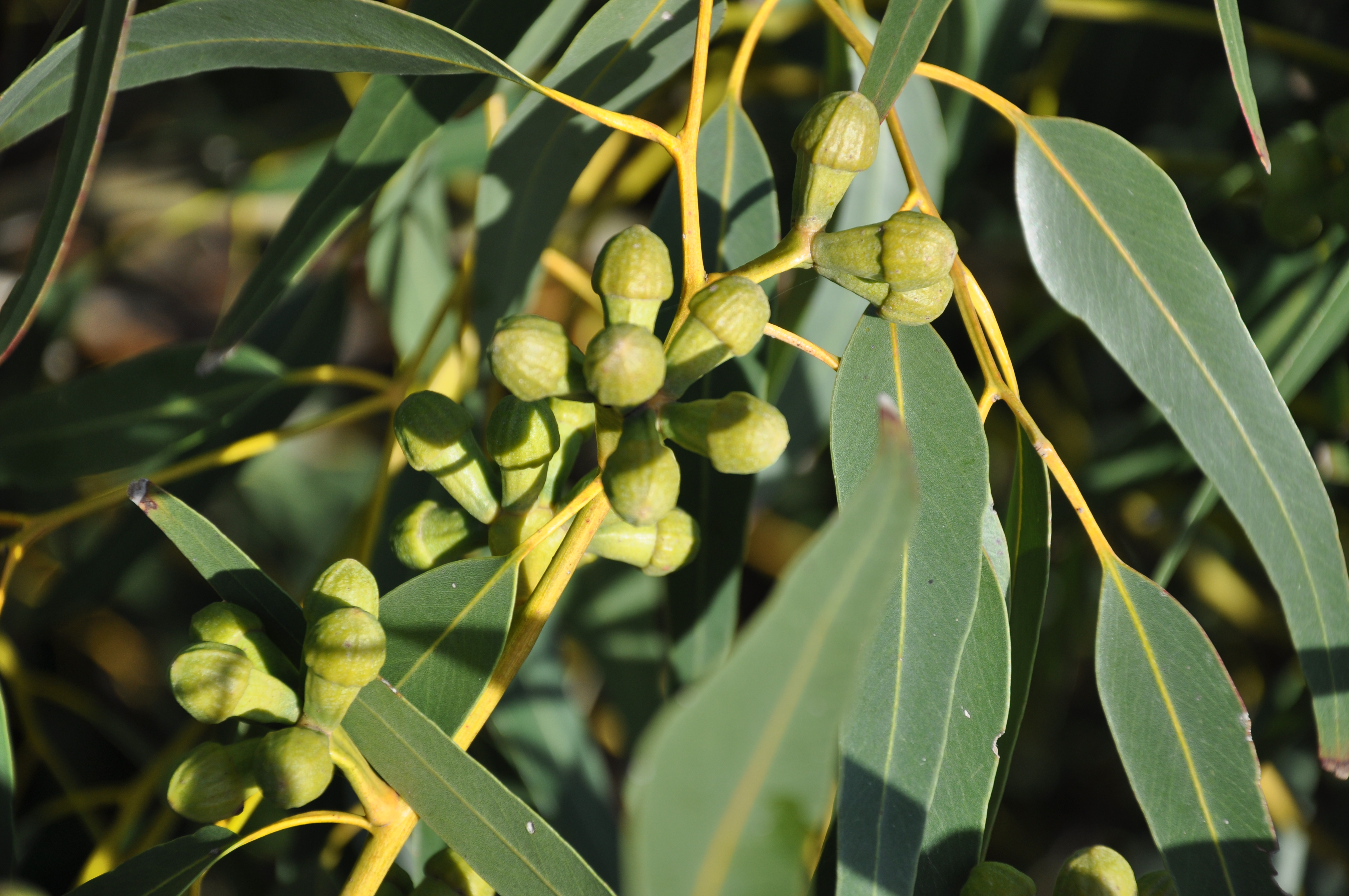 Eucalipto (Eucalyptus gomphocephala), Parque periurbano de La Barrosa, Chiclana, Cádiz, España. Flower buds